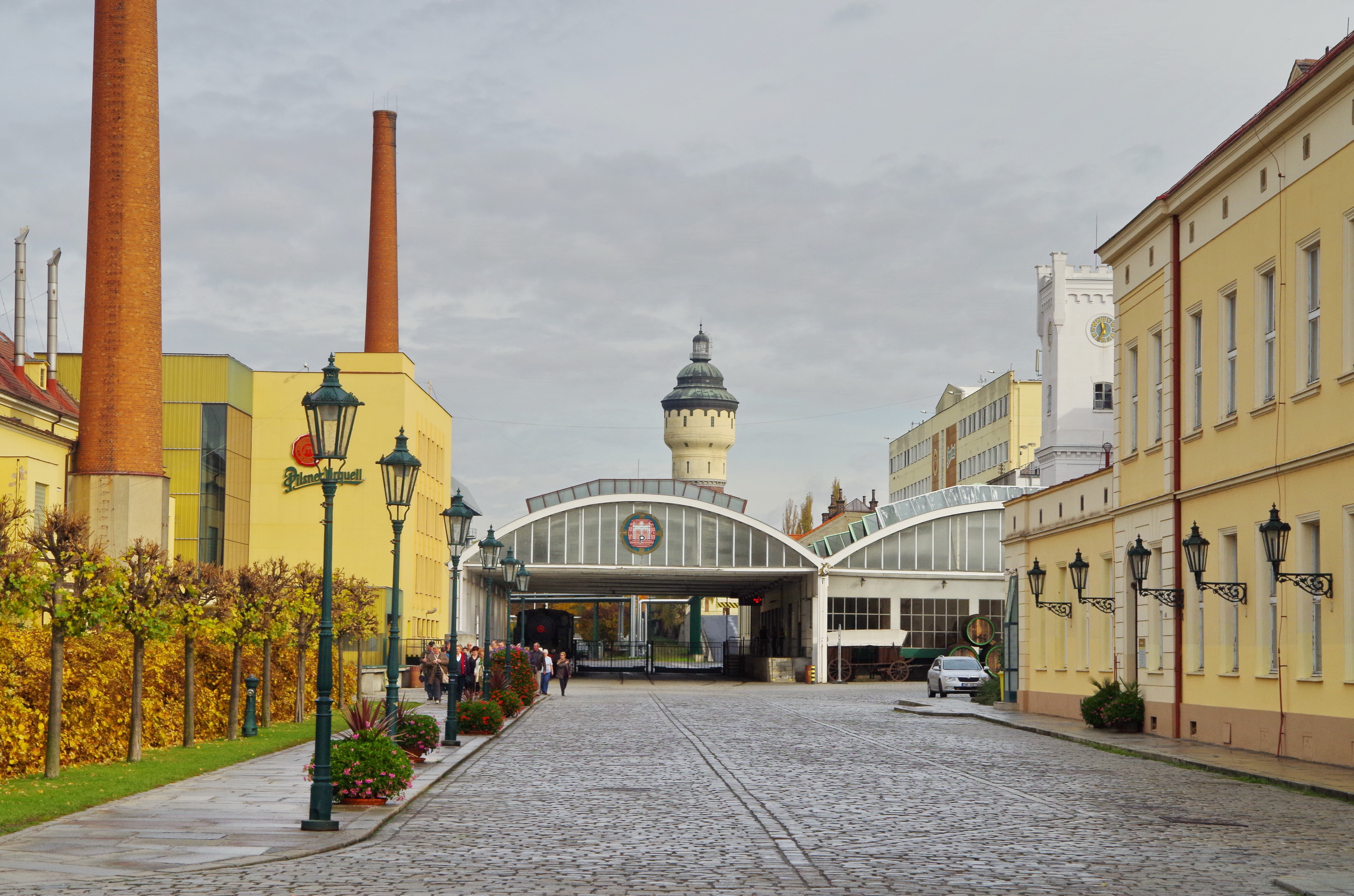 Brauerei Pilsner Urquell